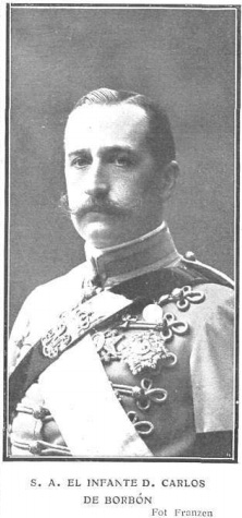 Retrato de Carlos de Borbón-Dos Sicilias, obra de Christian Franzen, recogido en la revista española Actualidades.